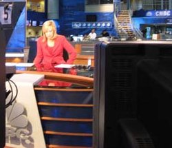 CNBC's Melissa Francis